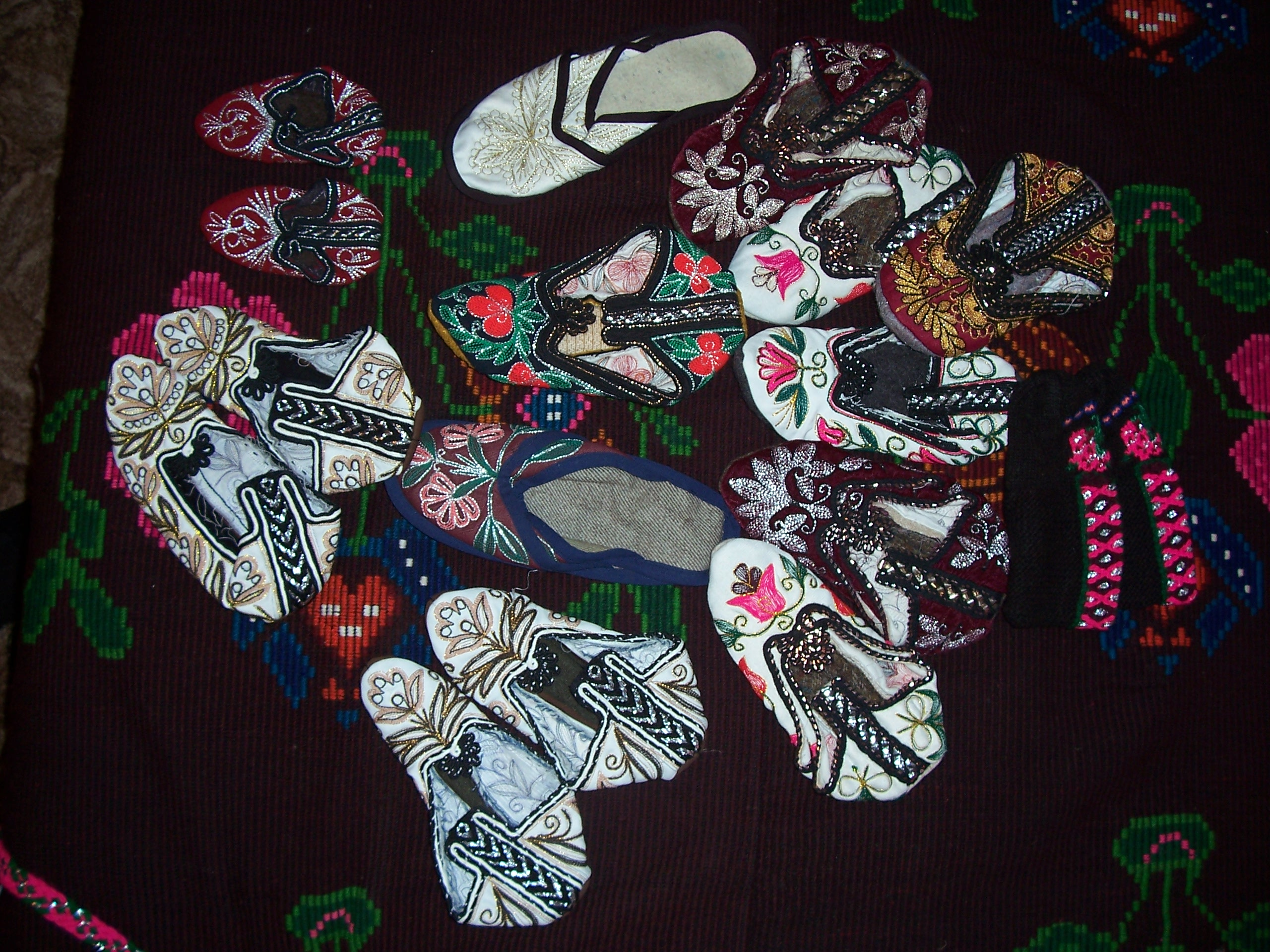 Терилици от Црънча (община Доспат)